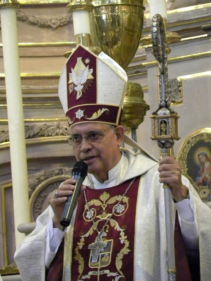 IV Obispo de Celaya